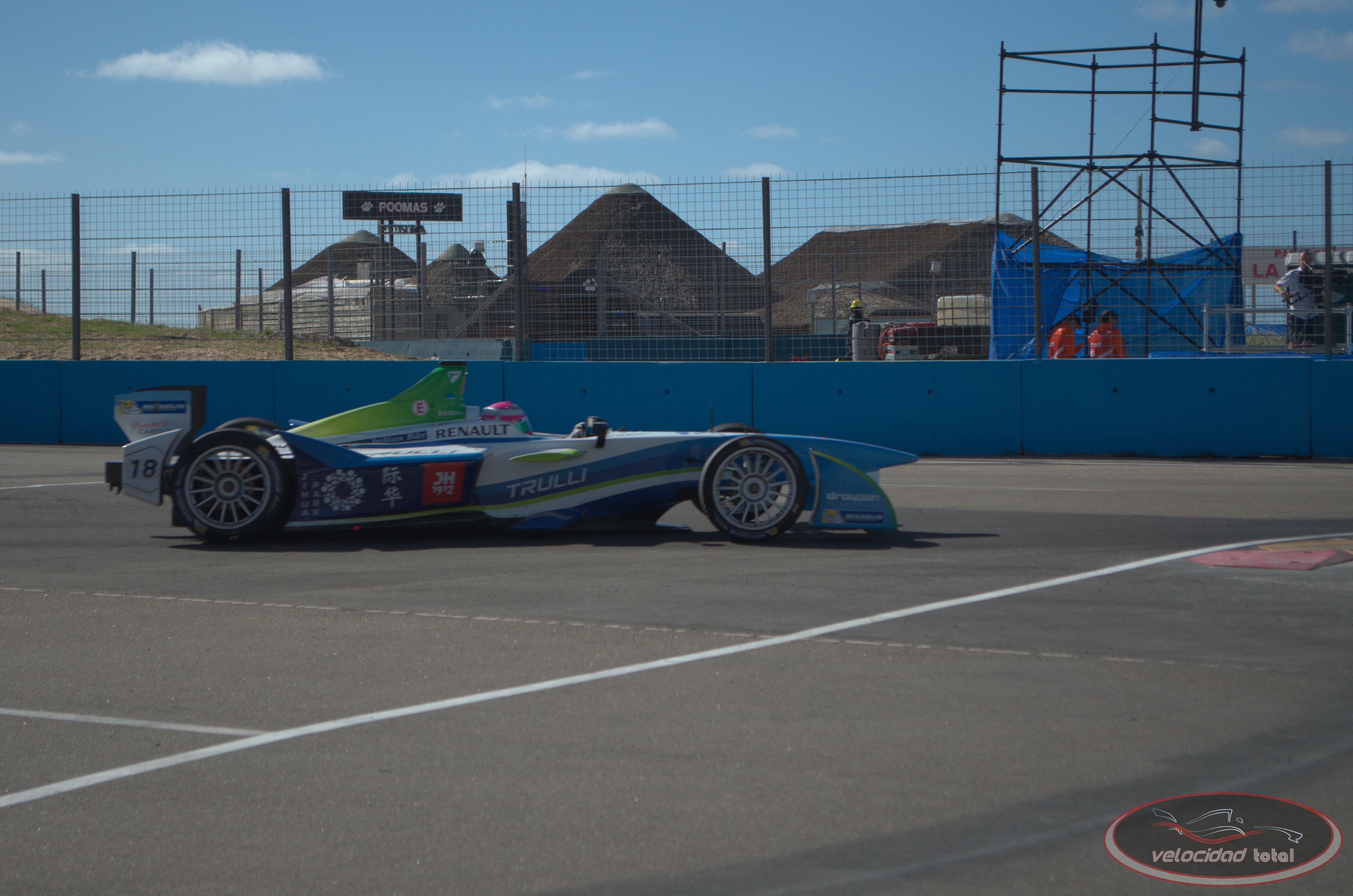 Solo se permite el uso de esta imagen mencionando a Velocidad Total como su autor. Imagen del equipo Trulli de Fórmula E, durante el Punta del Este ePrix de 2014.